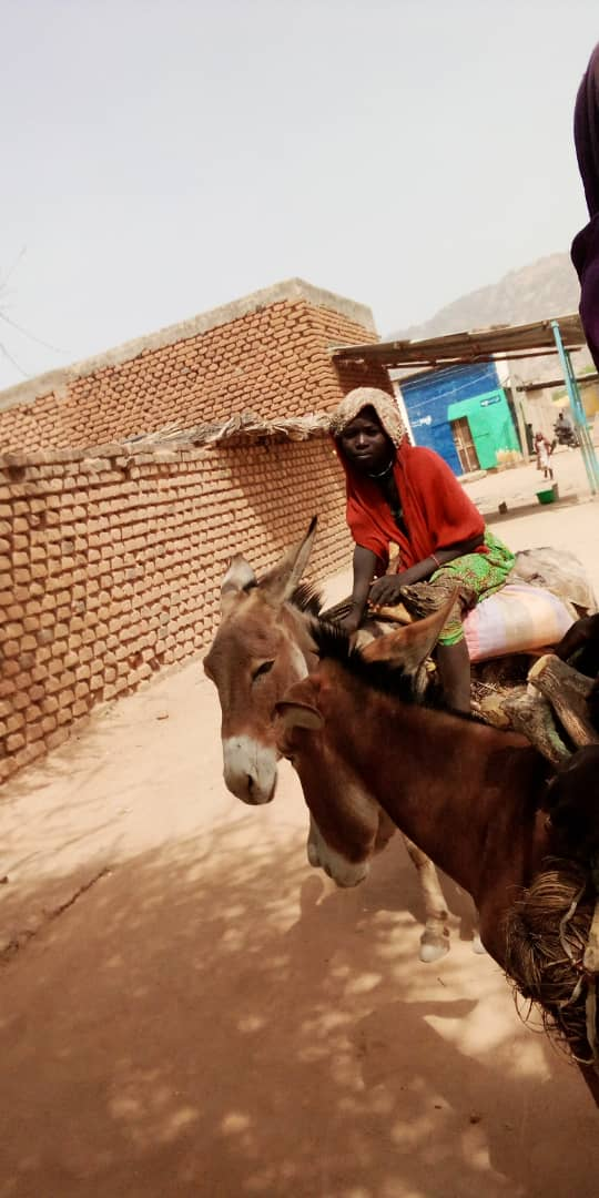 A mongo transport animal This is an image with the theme "Africa on the Move or Transport" from: Chad